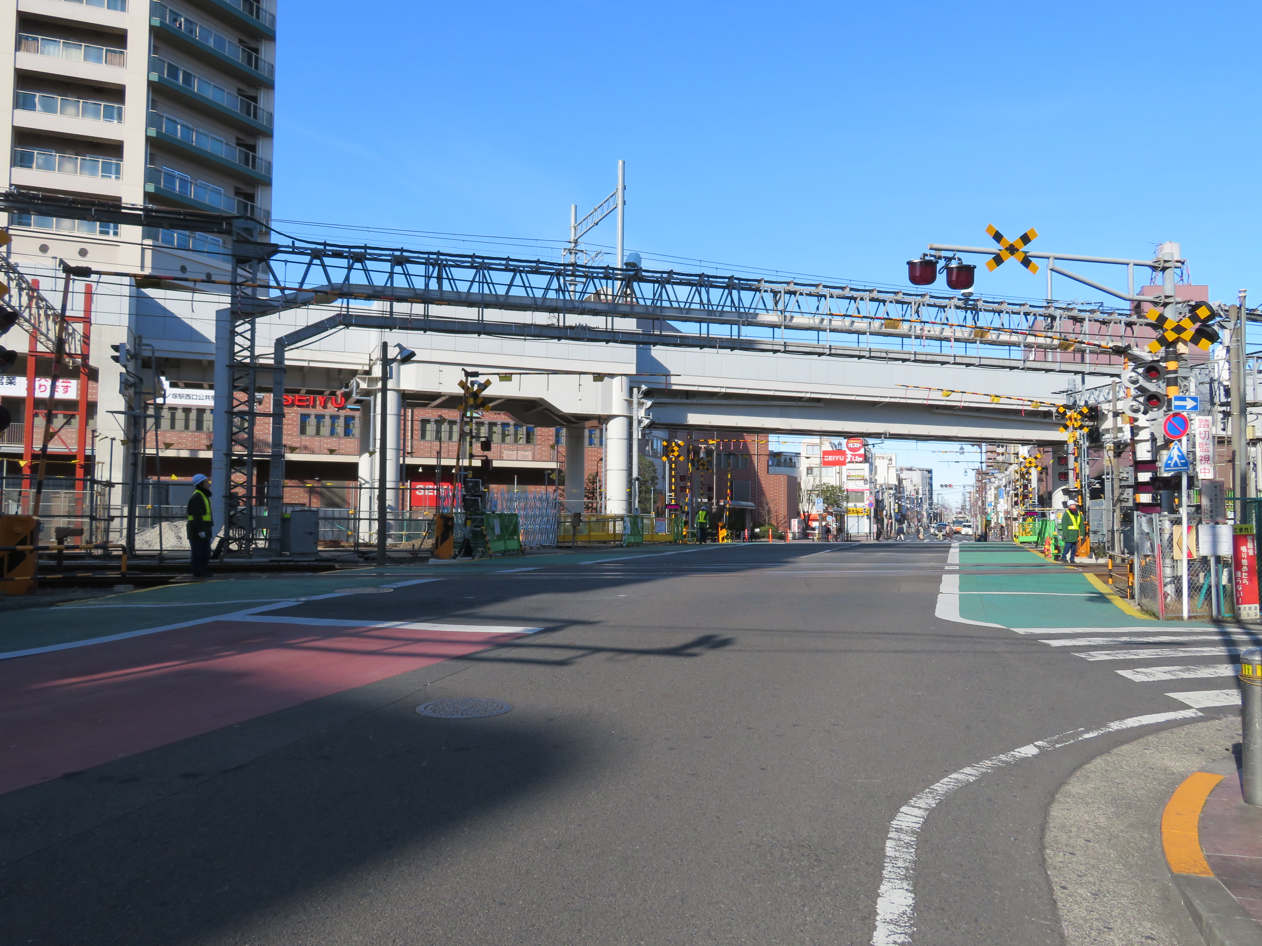 東武伊勢崎線竹ノ塚駅南側にある伊勢崎線第37号踏切道（東側区道より撮影）